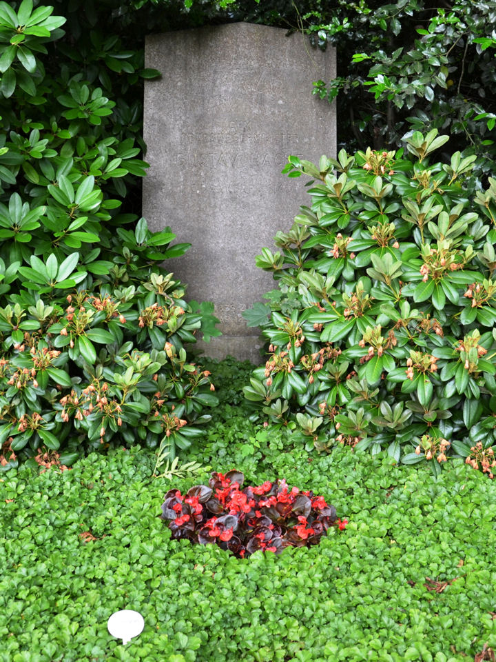 Gustav Hache, deutscher Politiker - Ehrengrab der Stadt Essen auf dem Ostfriedhof